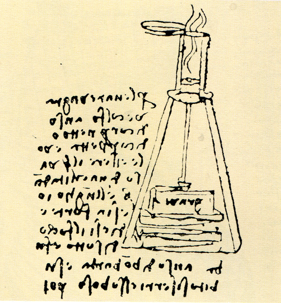 Leonardos Entwurf einer atmosphärischen Schießpulver-Maschine